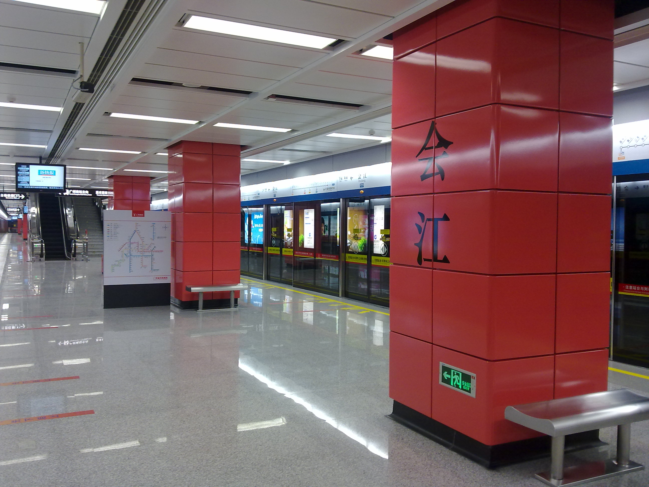 廣州地鐵會江站站台